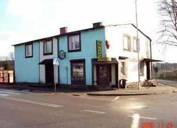 Piekarnia w Redle